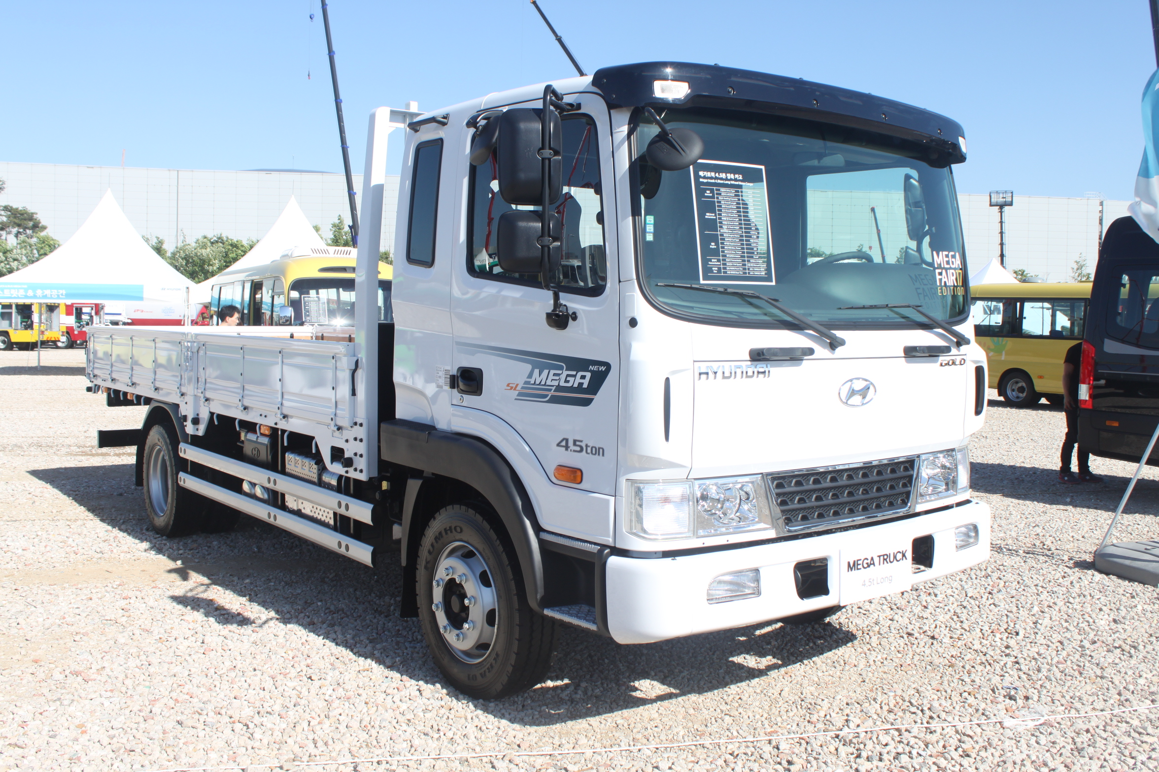 Hyundai là một trong những doanh nghiệp sản xuất ô tô lớn nhất Hàn Quốc, quốc gia này một trong những quốc gia có ngành công nghiệp ô tô đứng đầu khu vực châu Á và trên thế giới.